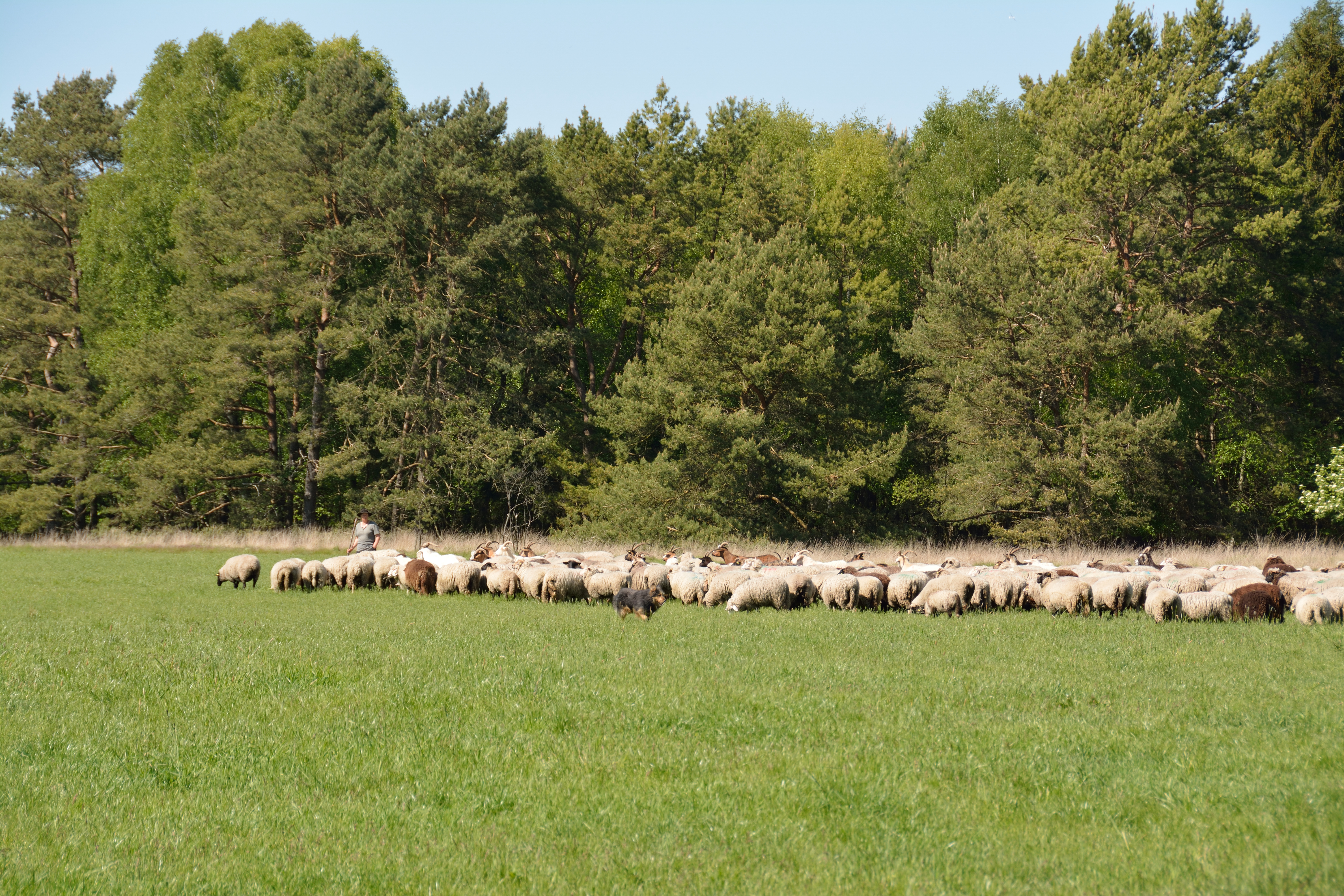 Naturschutzgebiet im Kreis Segeberg Impressionen aus dem Gebiet "Barker Heide"